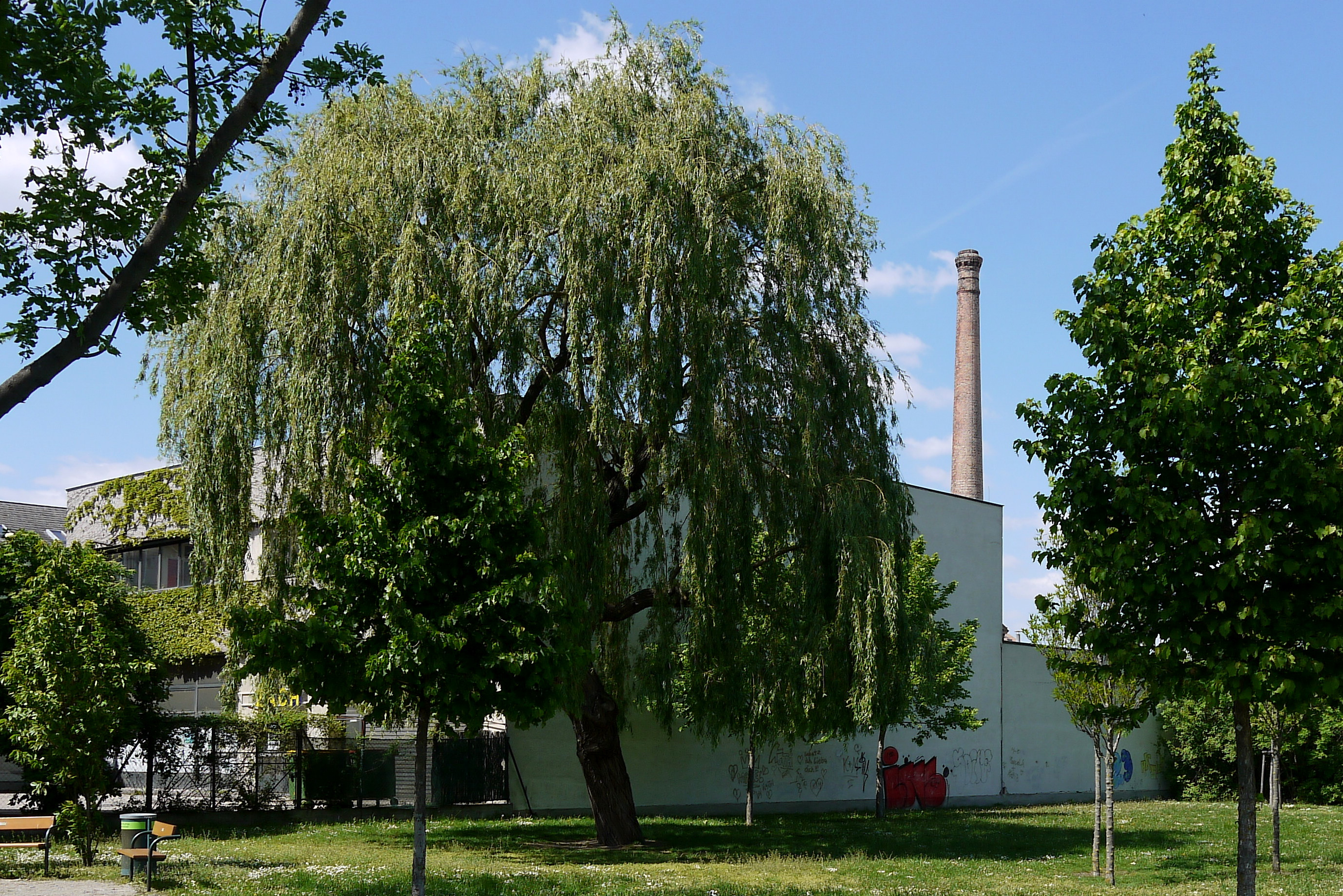 Trauerweide (Salix alba "Tristis") This media shows the natural monument in Vienna with the ID 814.